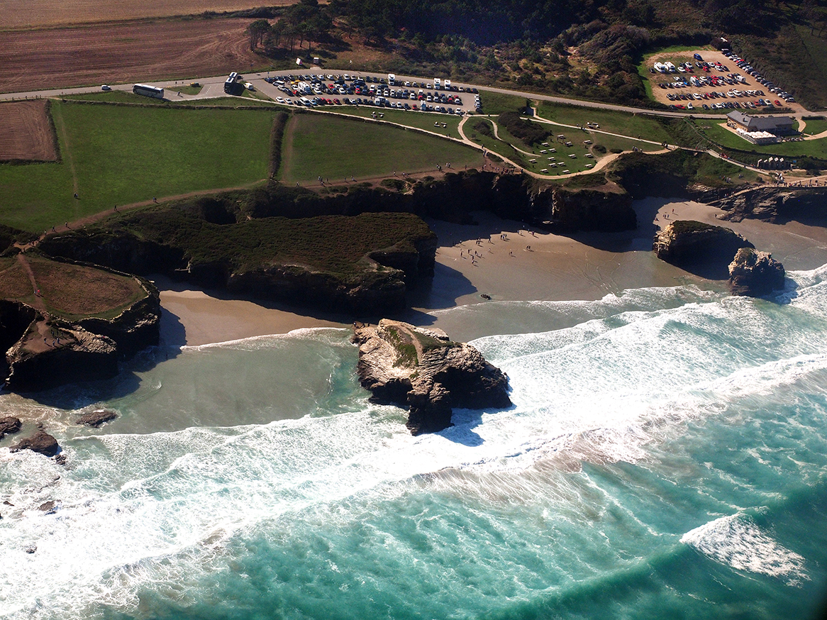 Vista aérea dela sablera de Les Catedrales